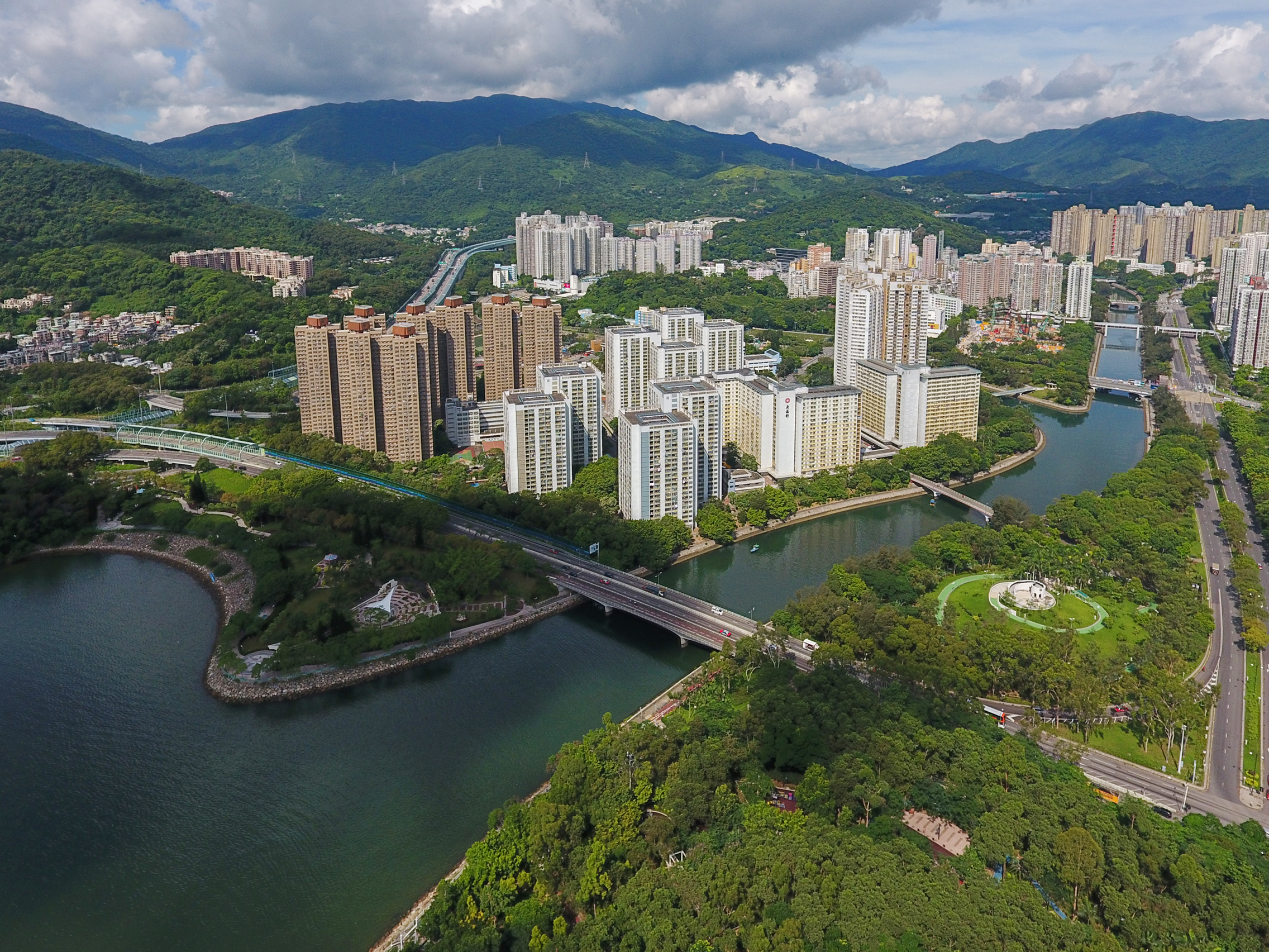 Kwong Fuk Estate overview